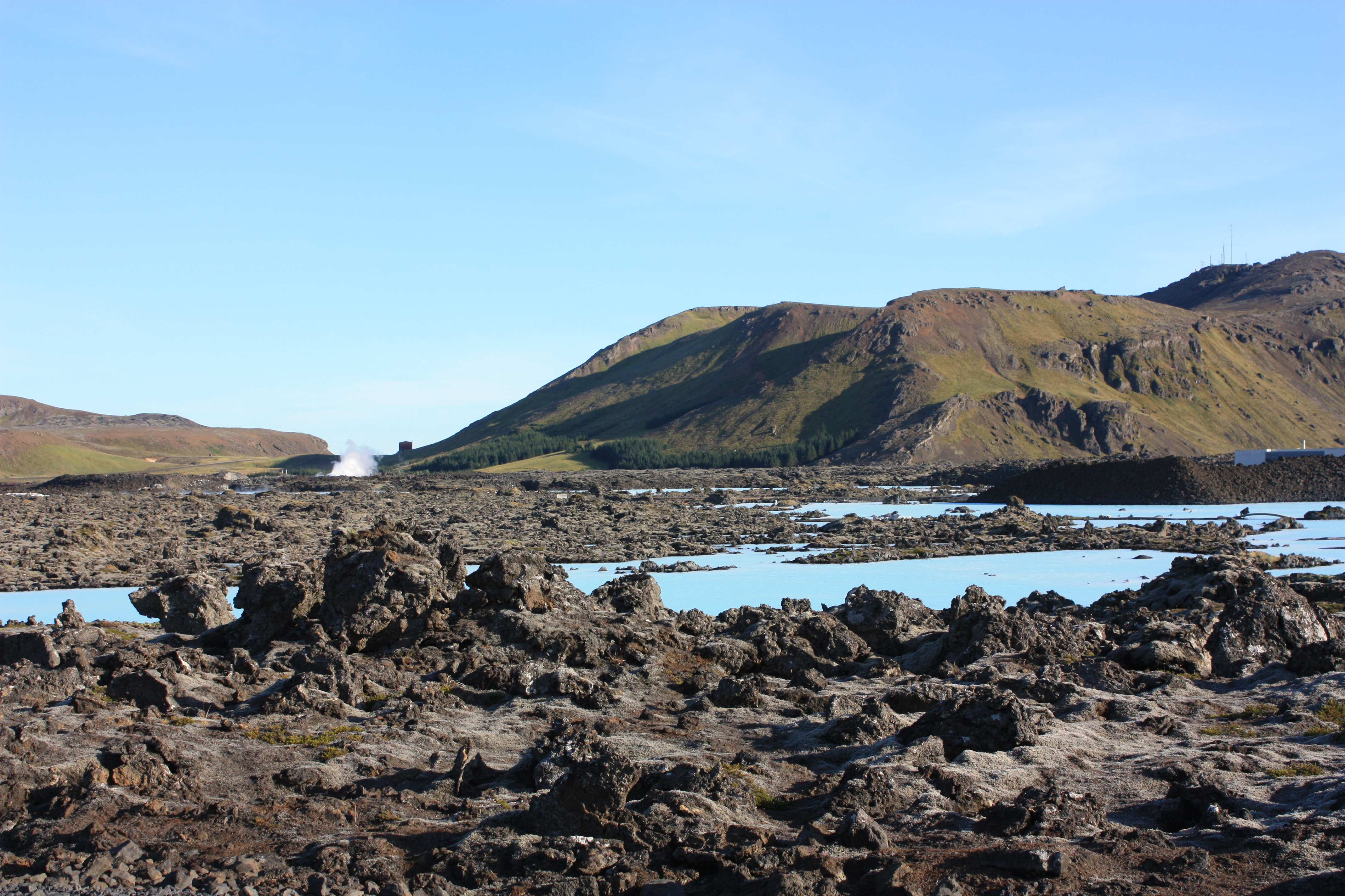 Blue Lagoon